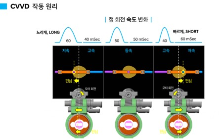 링크의 파란색 부위를 보면 구간에 따라 캠이 다른 속도로 회전함을 알 수 있다